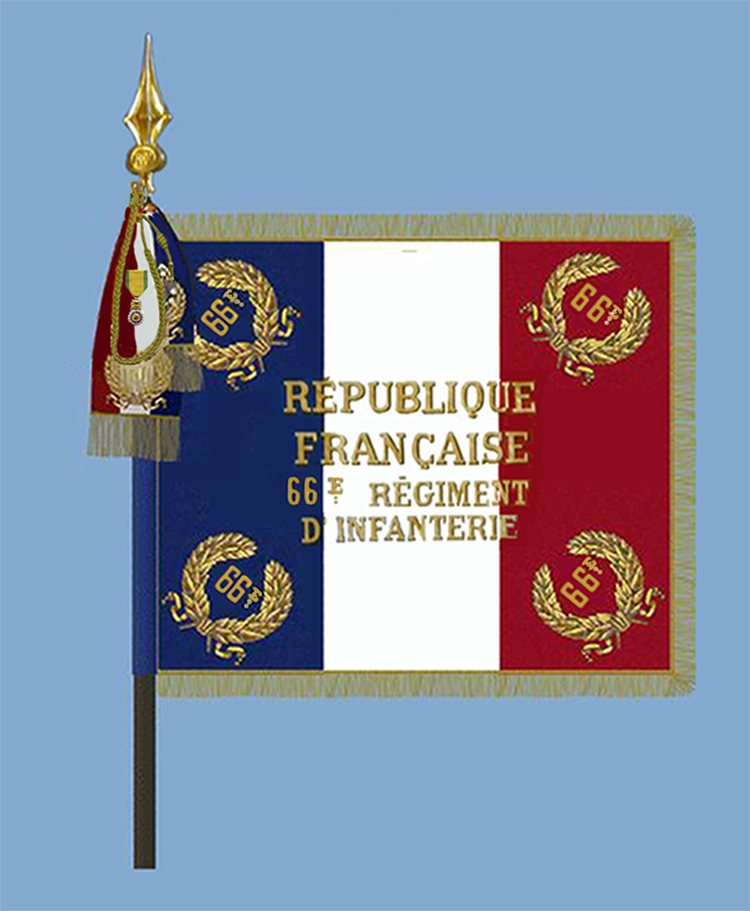 Fahne des 66. Infanterie Regiment 1980